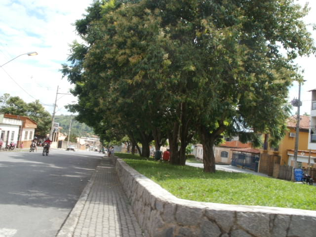 Vista de uma praça em Santa Cruz de Minas, Minas Gerais, Brasil.